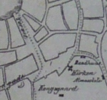 Kart over Stavanger torg i 1857